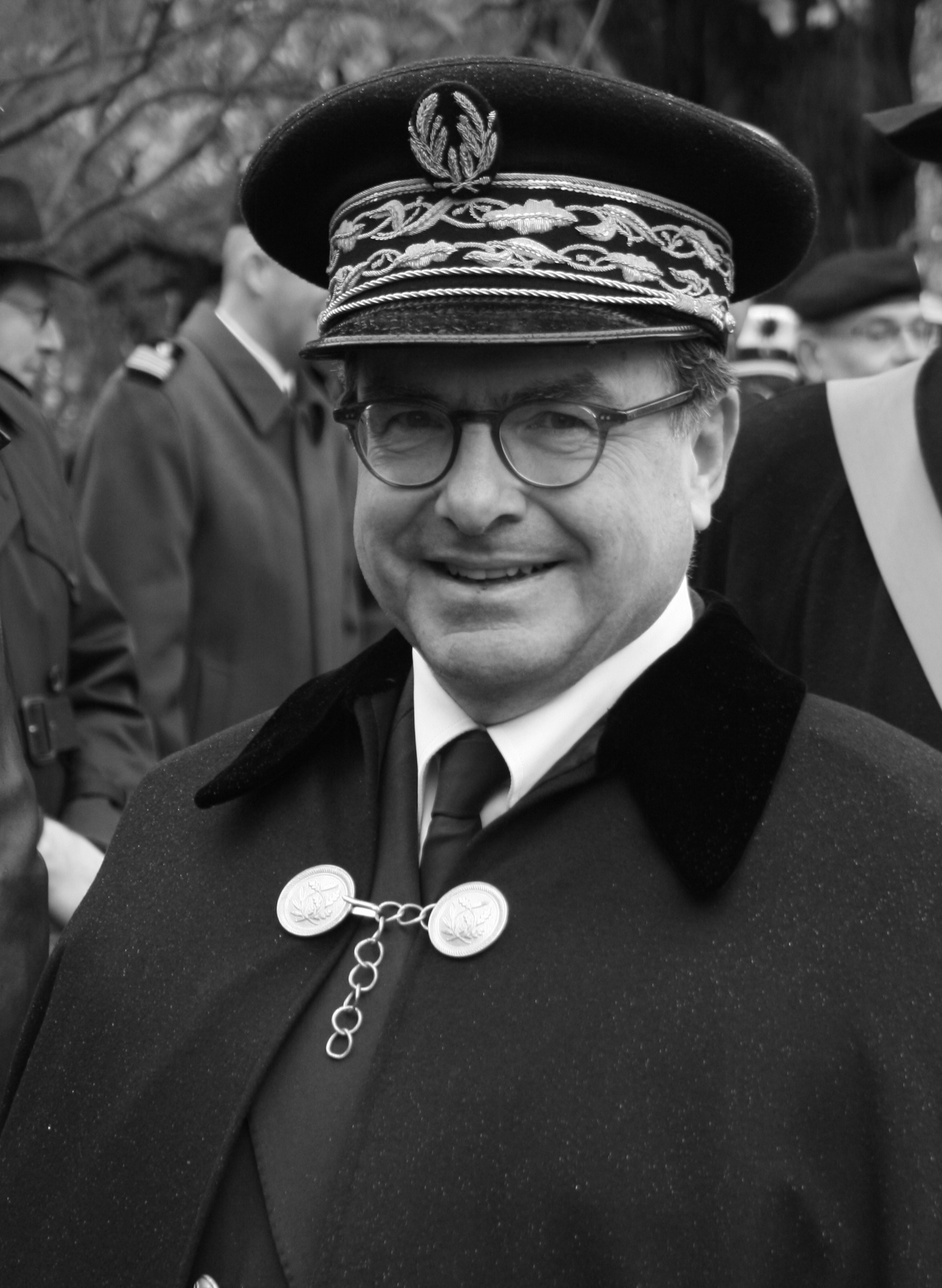 Pierre-Étienne Bisch, Préfet de la Région Alsace et du du Bas Rhin.